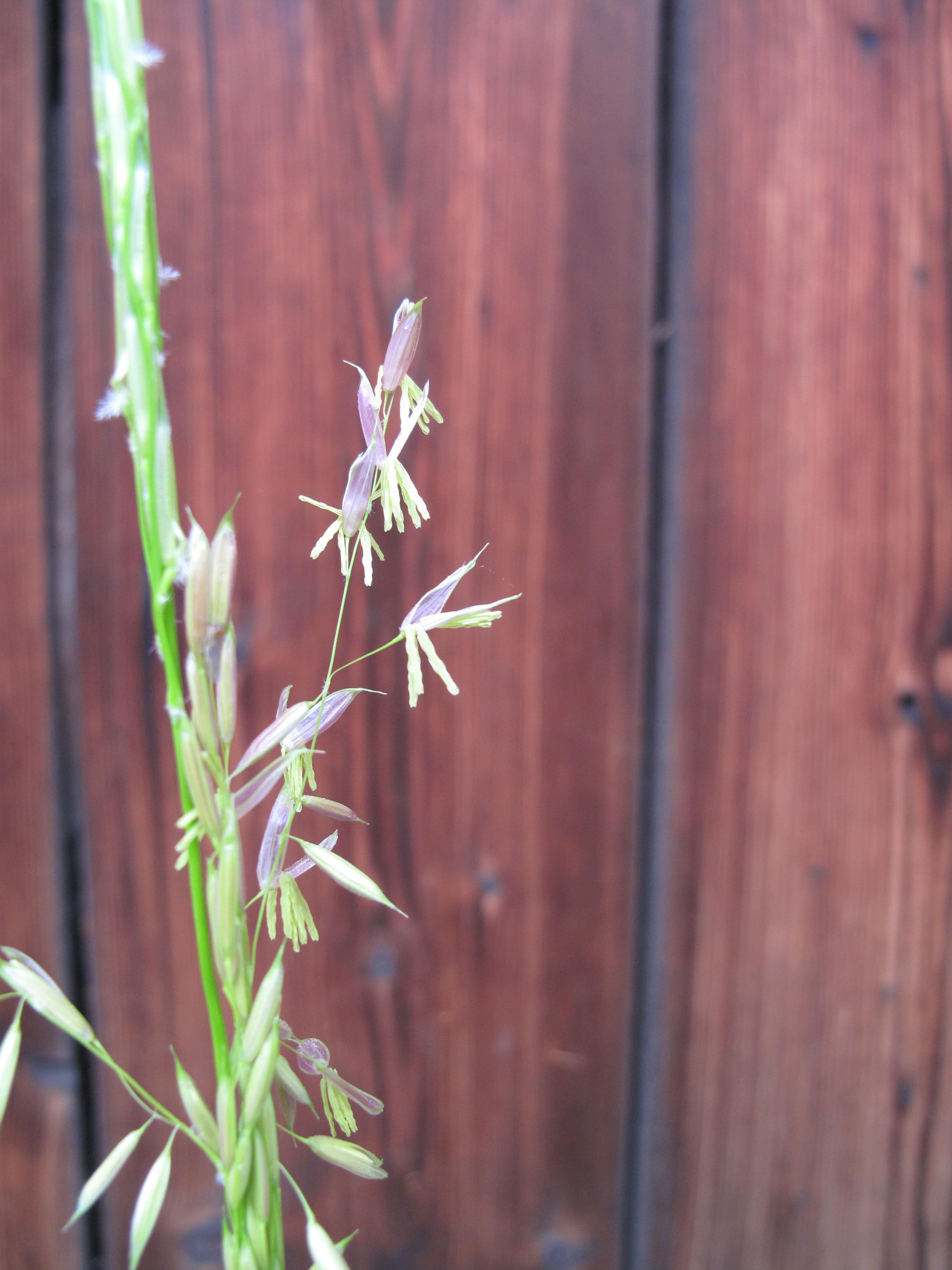 Wasserreis, Blütenstand